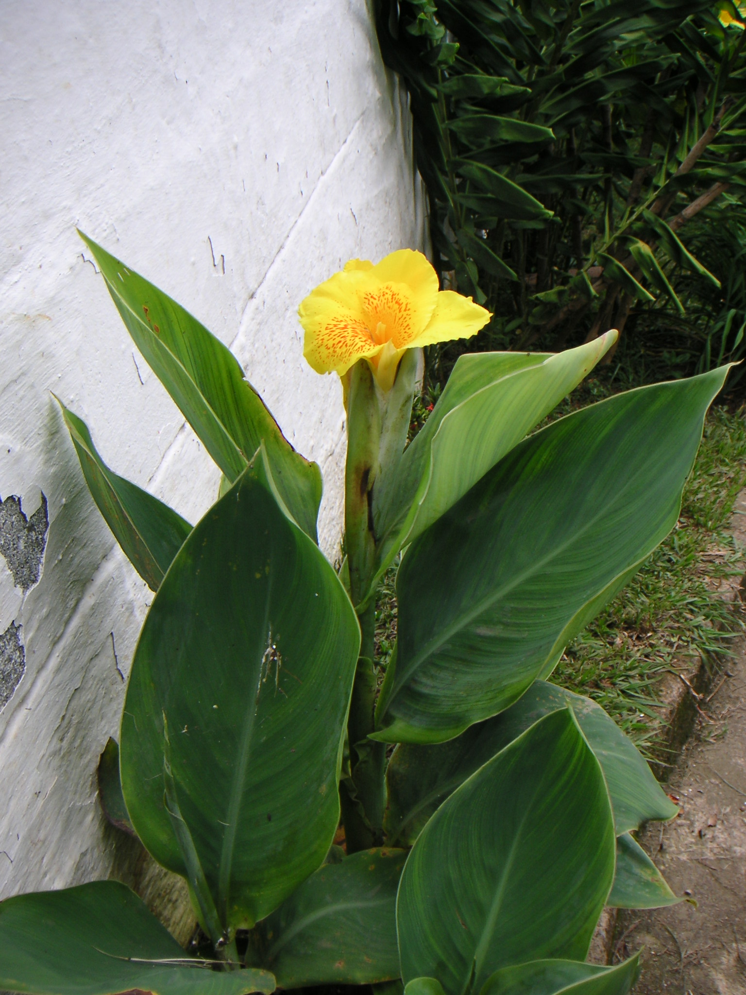 Canna ×generalis, Cannaceae, Cali / Kolumbien